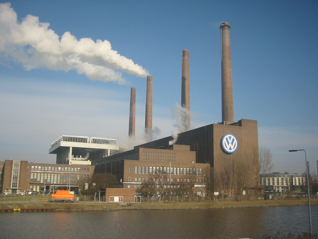 Wolfsburg, Germany: VW-Werk